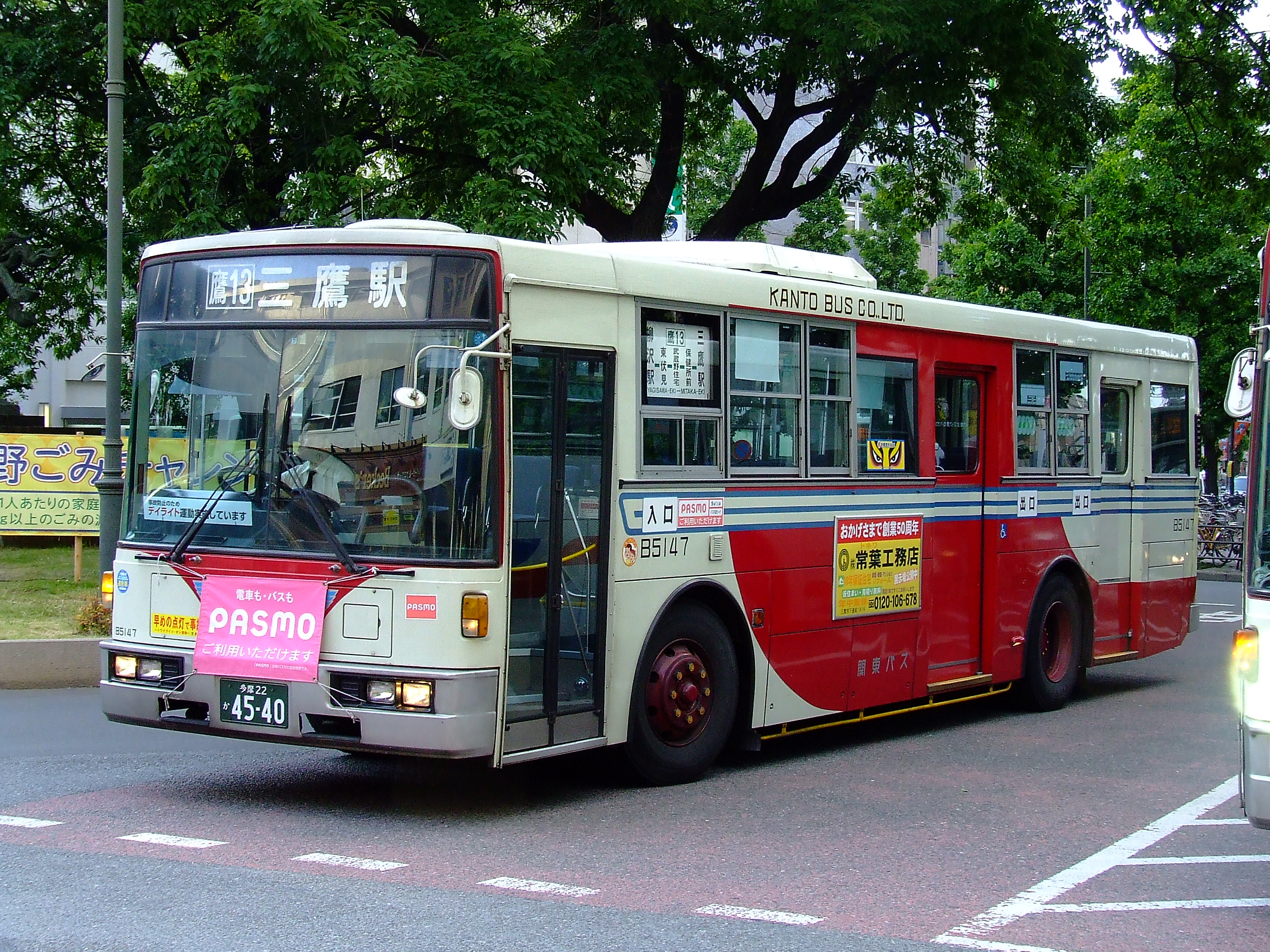 関東バスB5147号車（3扉車） 三鷹駅にて撮影 右手にかすかに別のバスが映りこんでいるのでいずれ撮り直します^^